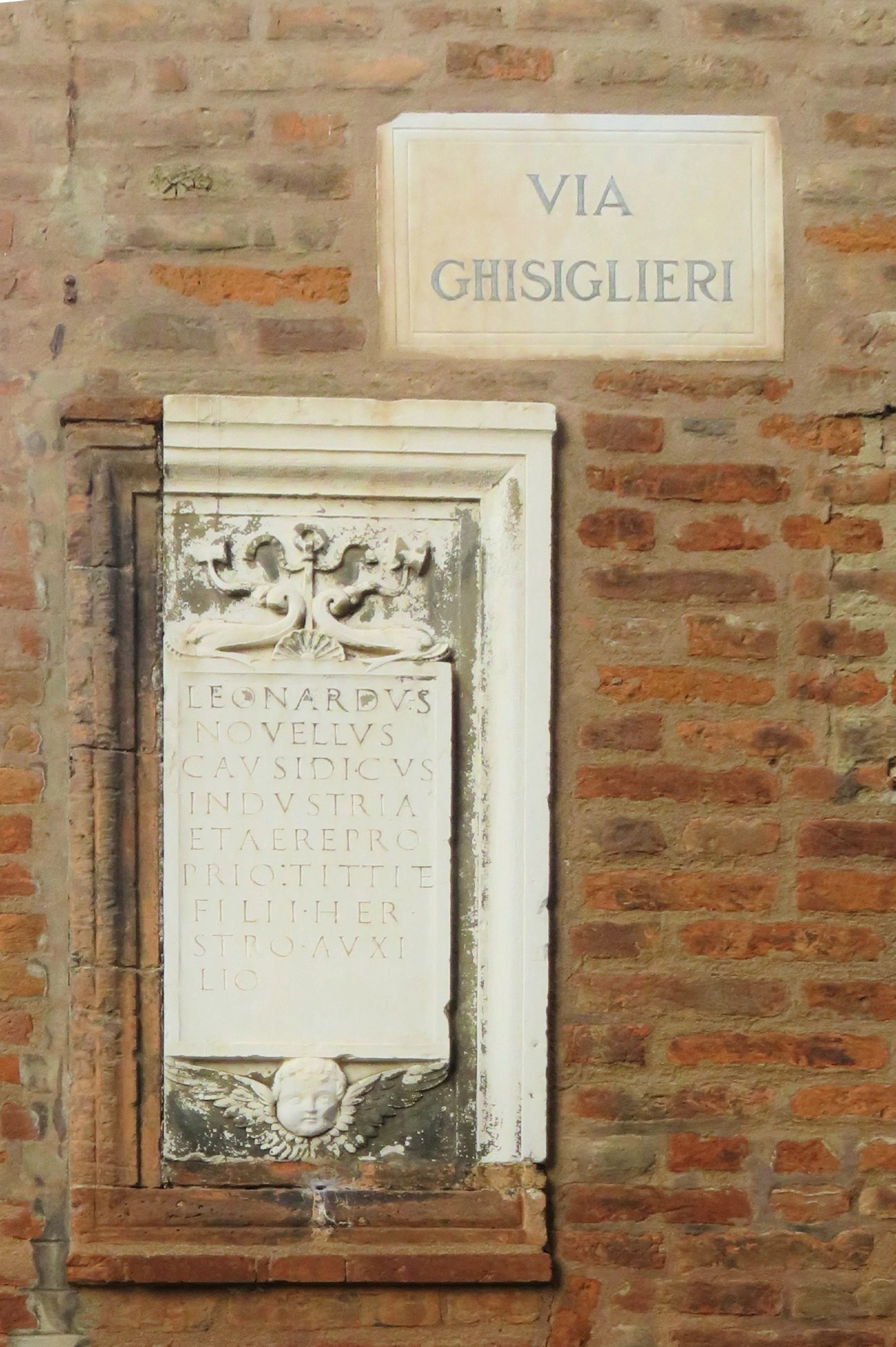 Antico palazzo di Ferrara. Il primo proprietario fu Leonardo Novelli Testo scolpito sull'epigrafe: LEONARDUS NOVELLUS CAUSIDICUS INDUSTRIA ET AERE PRO PRIO TITTI ET FILII HER. STRO. AUXI LIO